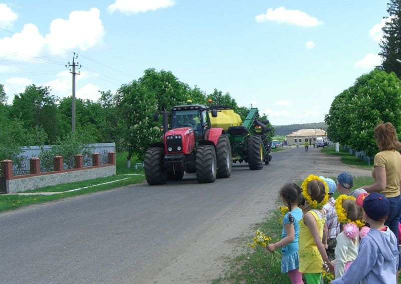 На улице в самотоевке